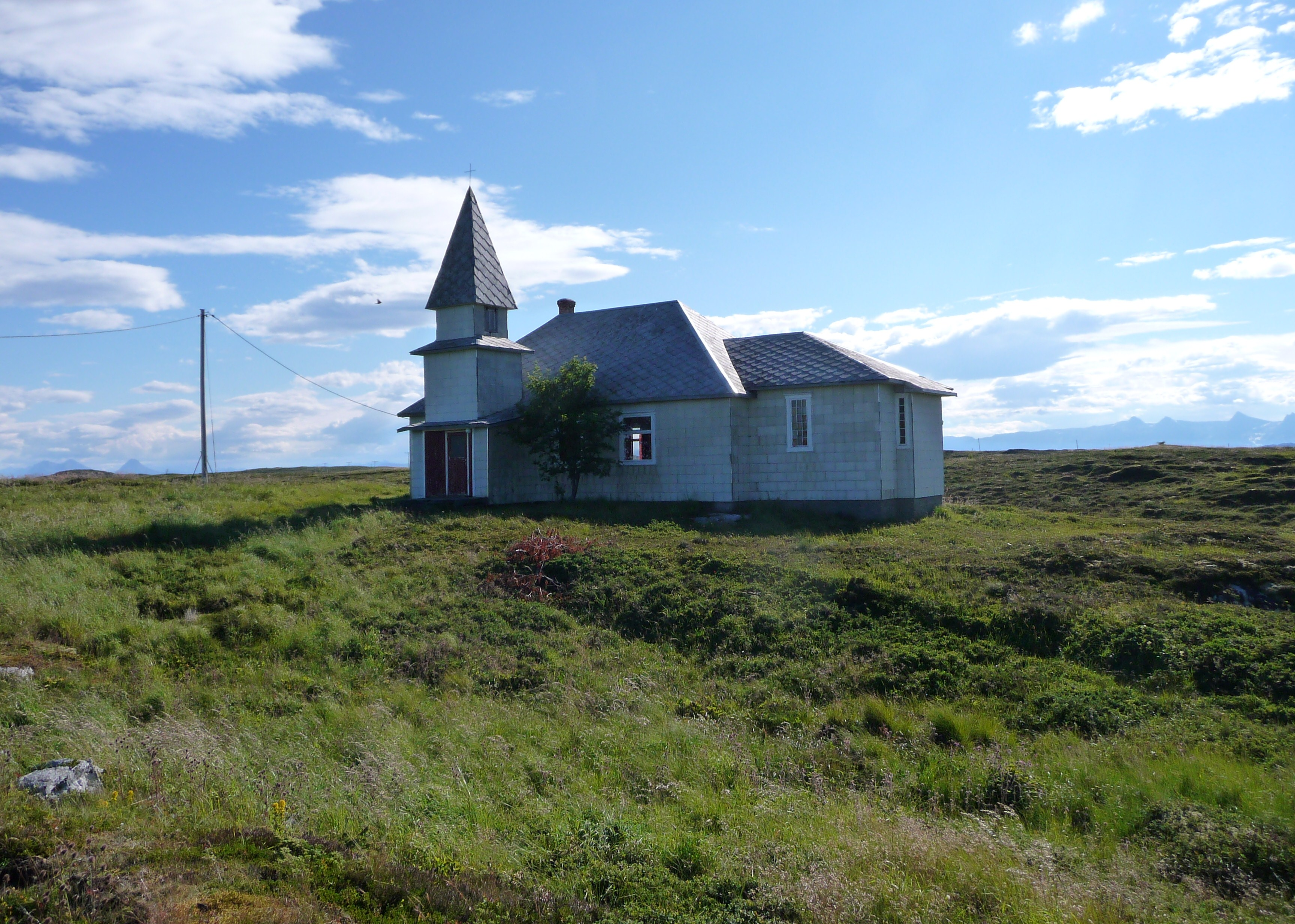 Gåsvær kapell (Herøy)